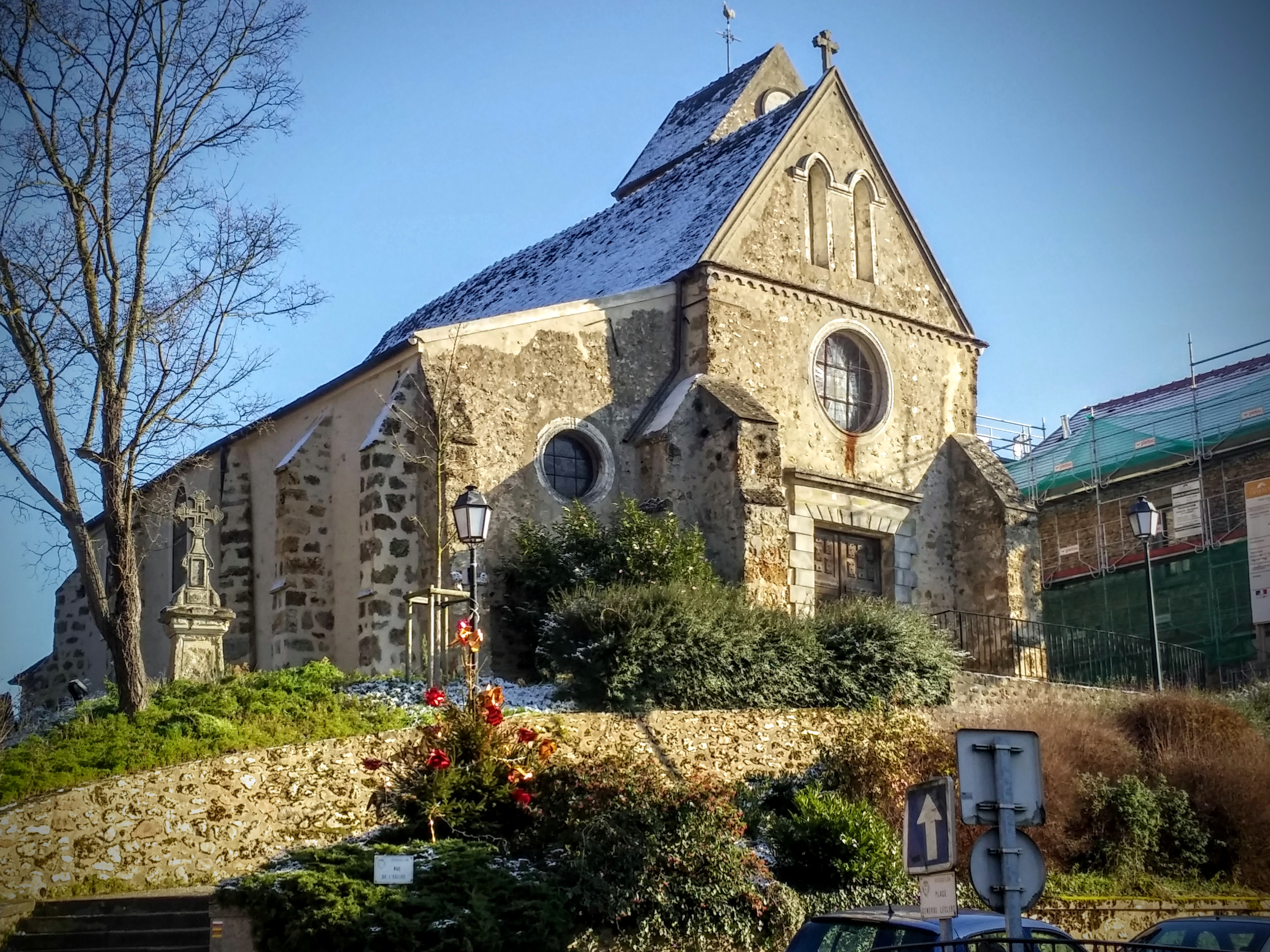 L'église Saint-Rigomer et Sainte-Ténestine de Vauhallan (Essonne)